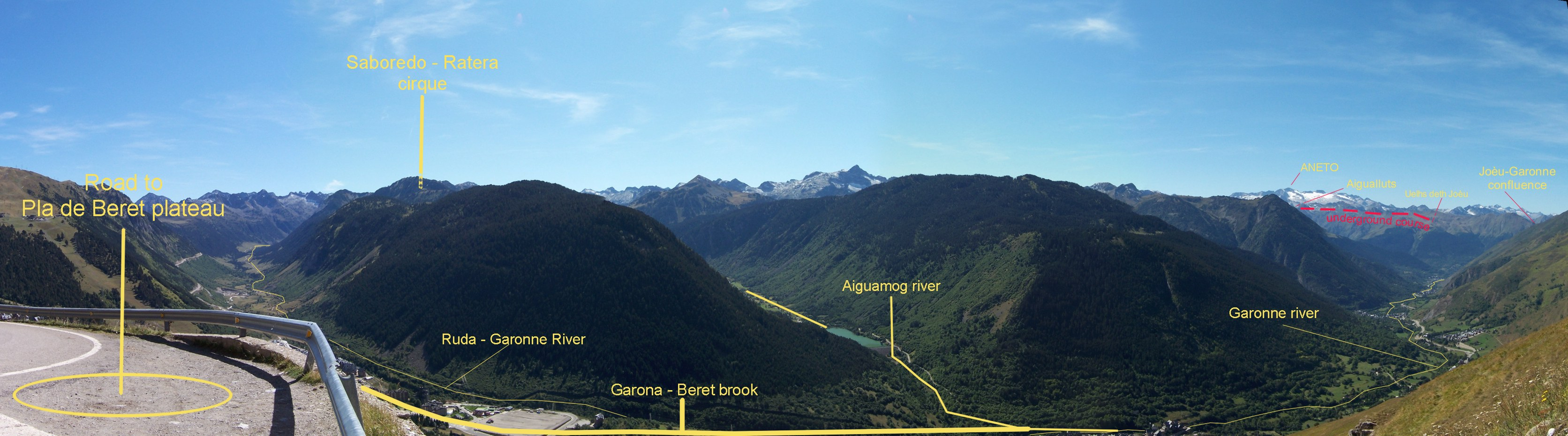 Valle de Arán, desde las cuestas de Ruda hasta Viella. Tomada desde la carretera del Pla de Beret.